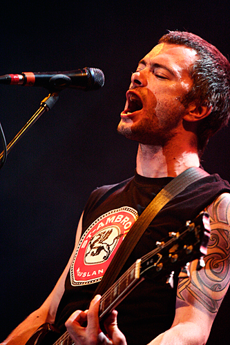 Guillaume Beauregard, des Vulgaires Machins, en spectacle au Festival d'été de Québec le 12 juillet 2008.